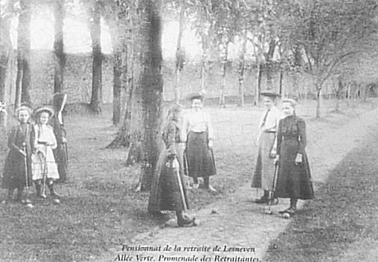 Lesneven : retraitantes de la Retraite déambulant dans l'Allée verte vers 1920.